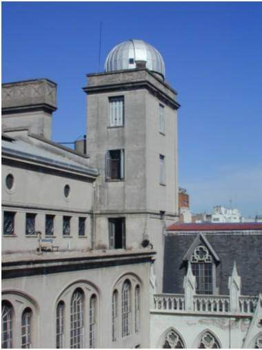 Cupula del Observatorio San José vista superior